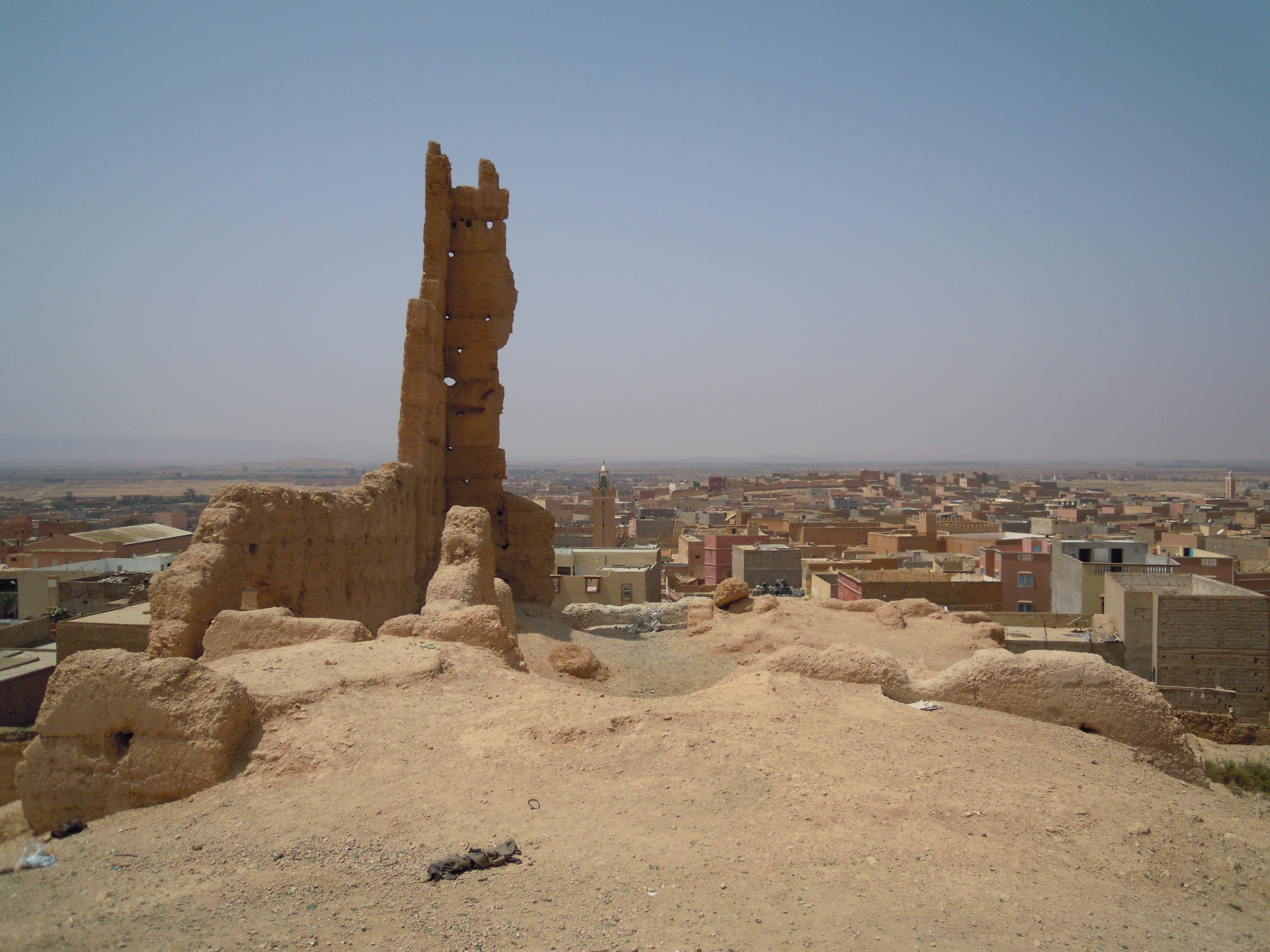 Ruinas Guelmim, Marruecos